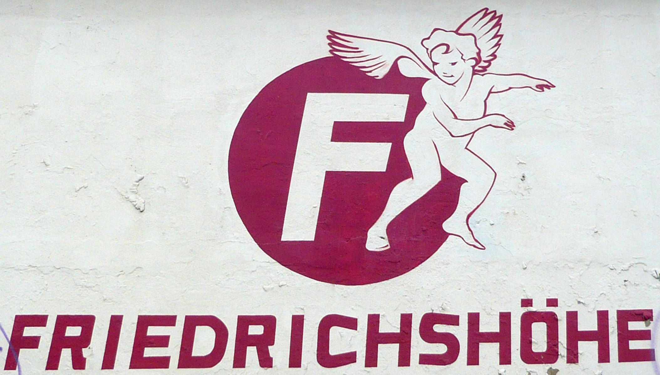 Berlin-Friedrichshain, ehemalige Brauerei Patzenhofer-Schultheiß, nach 1990 neu angebrachter Schriftzug am Giebel des Biergarten-Pavillons